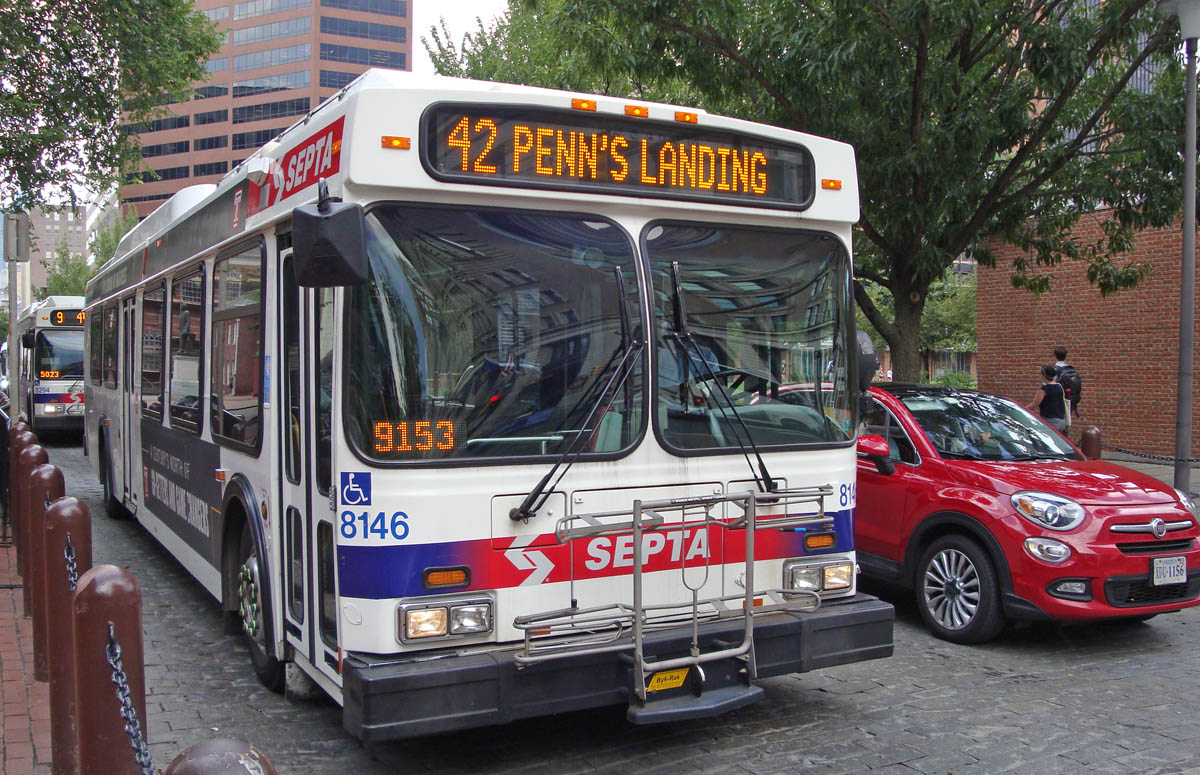 Автобус New Flyer DE41LF, принадлежащий транспортному управлению юго-восточной Пенсильвании - в Филадельфии.